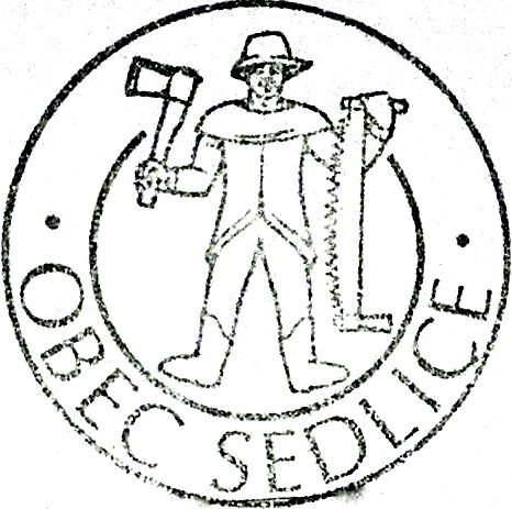 Pečať obce Sedlice.Okres Prešov. Slovensko.